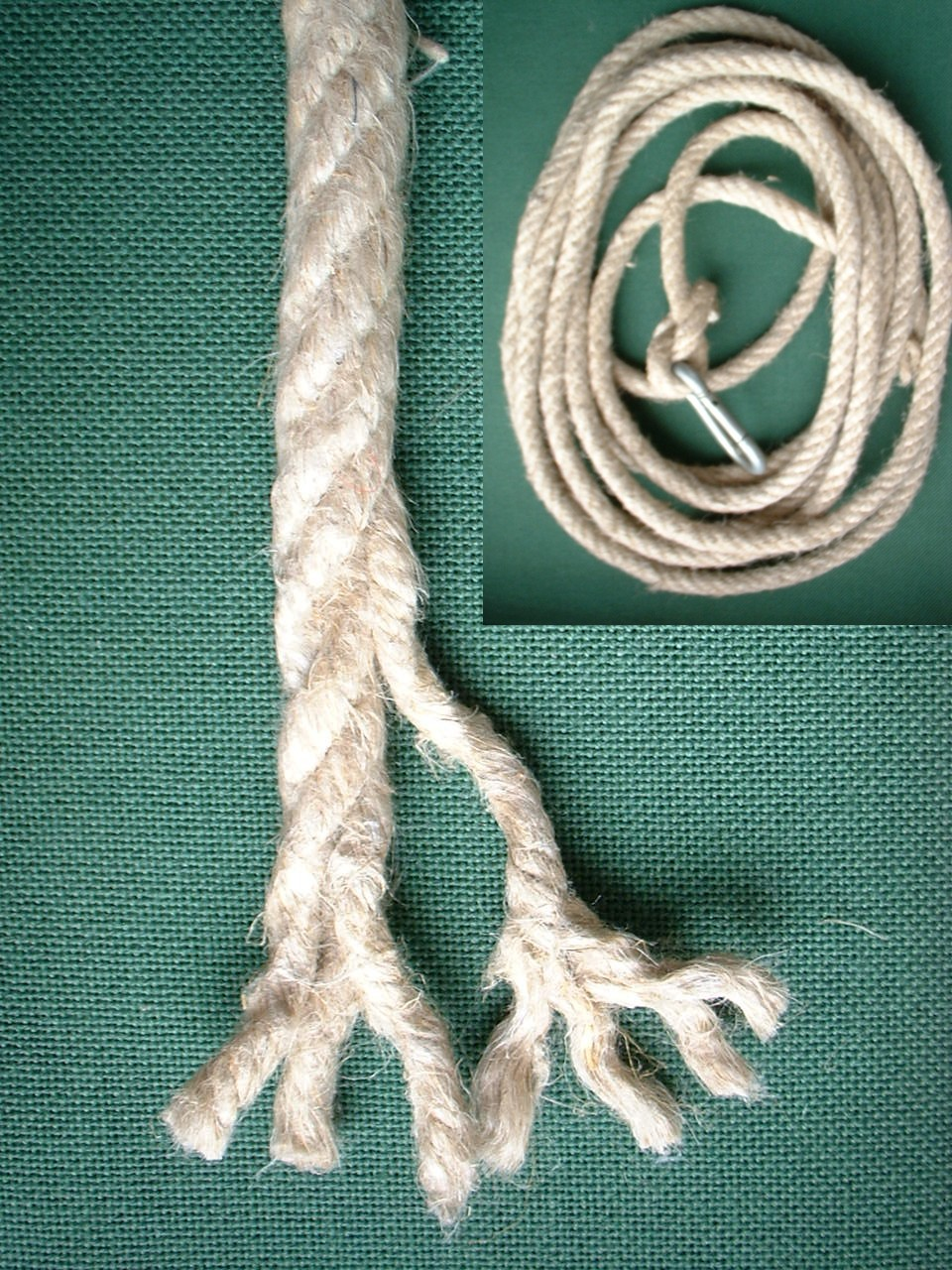 Hanfseil 10 mm